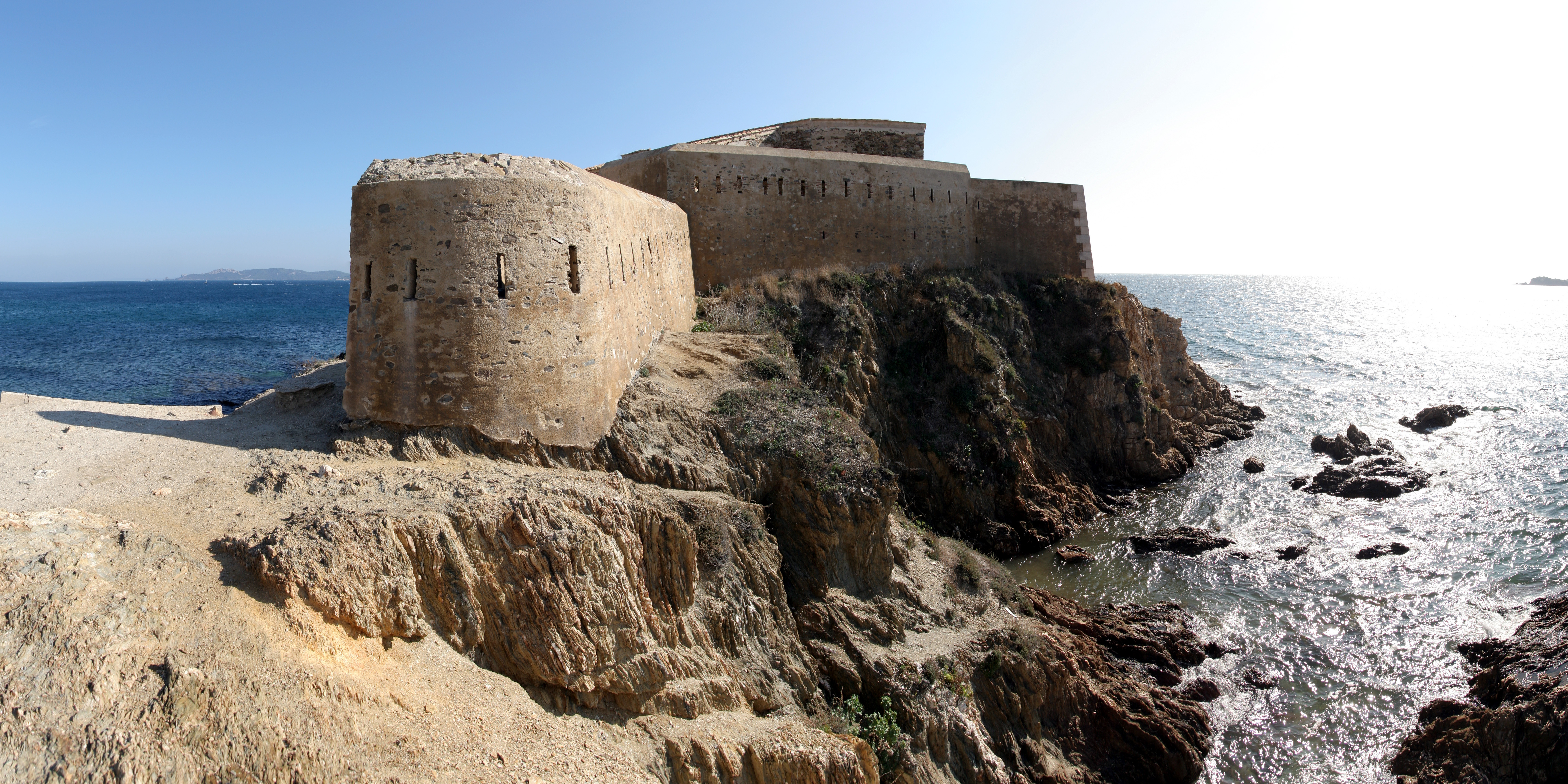 Die Festung Tour Fondue auf der Halbinsel Giens an der Côte d’Azur. Mit Hugin aus acht einzelnen Bildern zusammengesetztes Panorama.